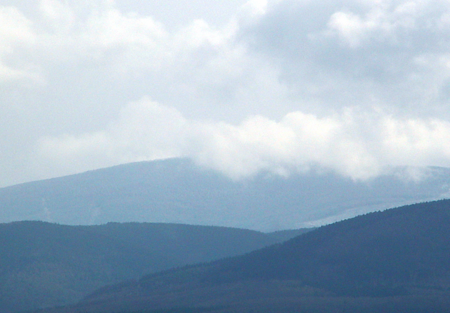 Harzgipfel hinter Wolken